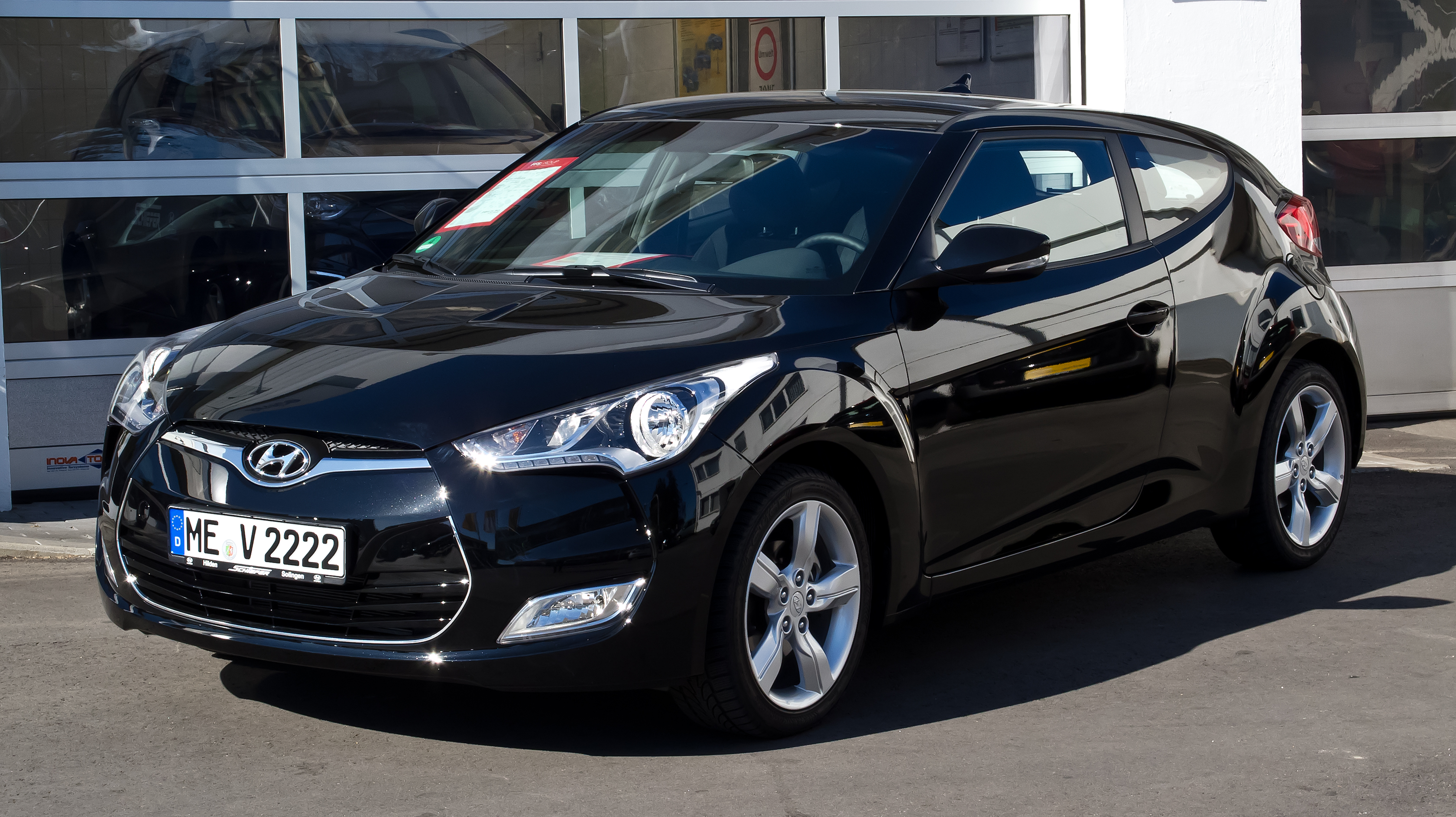 Hyundai Veloster 1.6 GDI Style